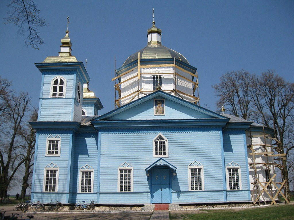 церква в с.Городець